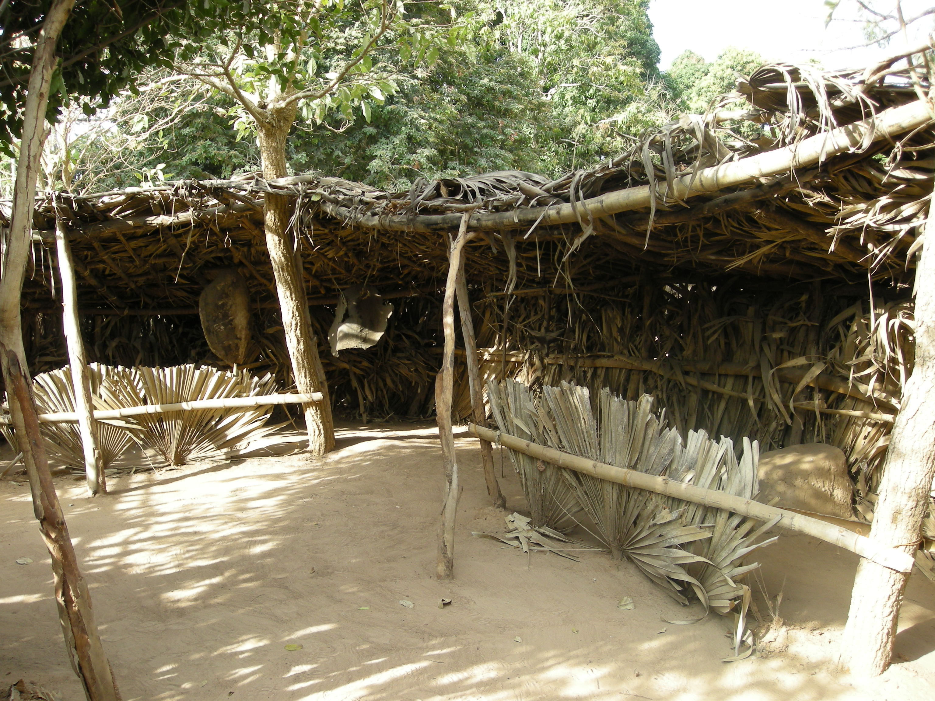 Musée des traditions diolas à Mlomp (Casamance, Sénégal)